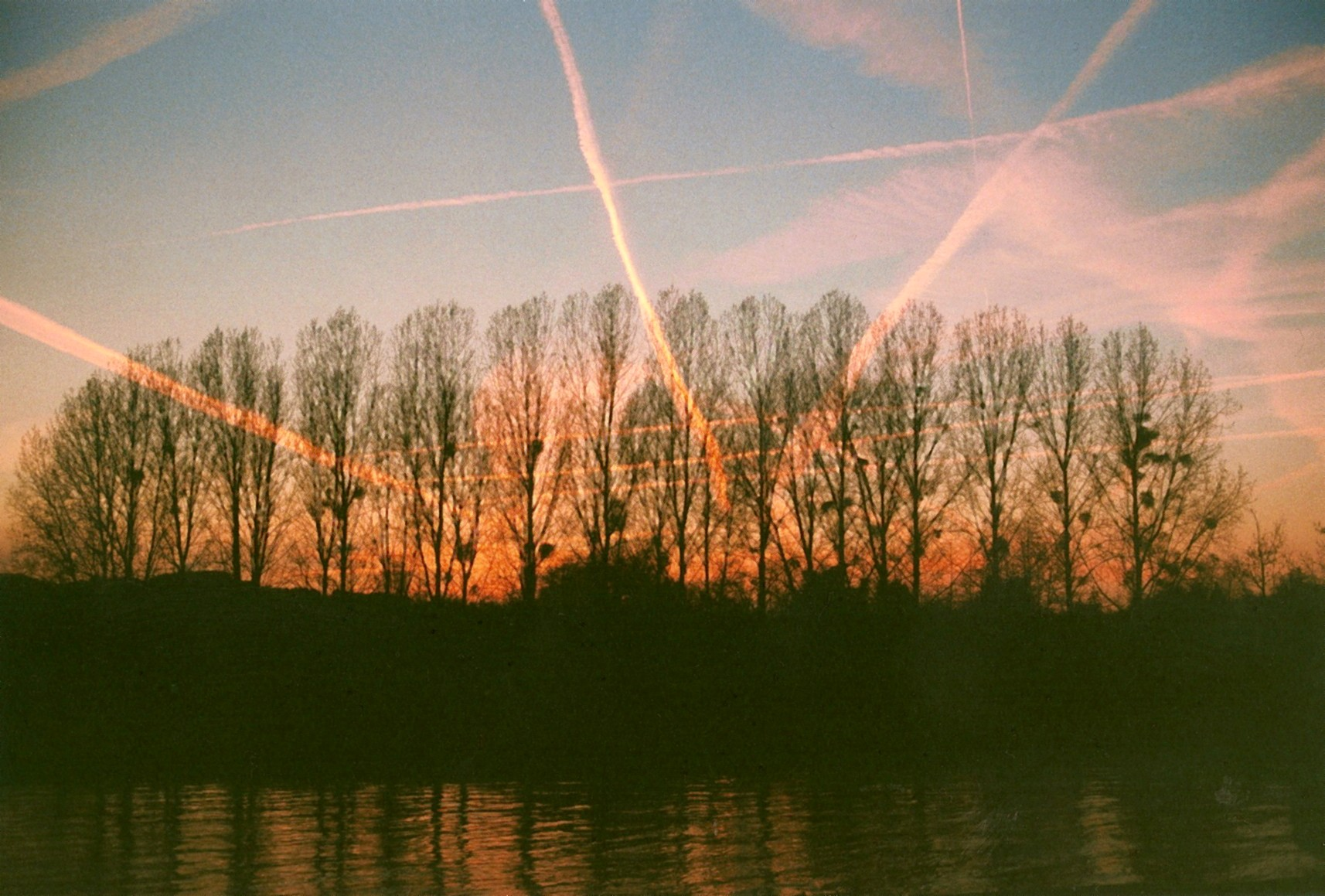 L'île de Dave. Eigen opname.